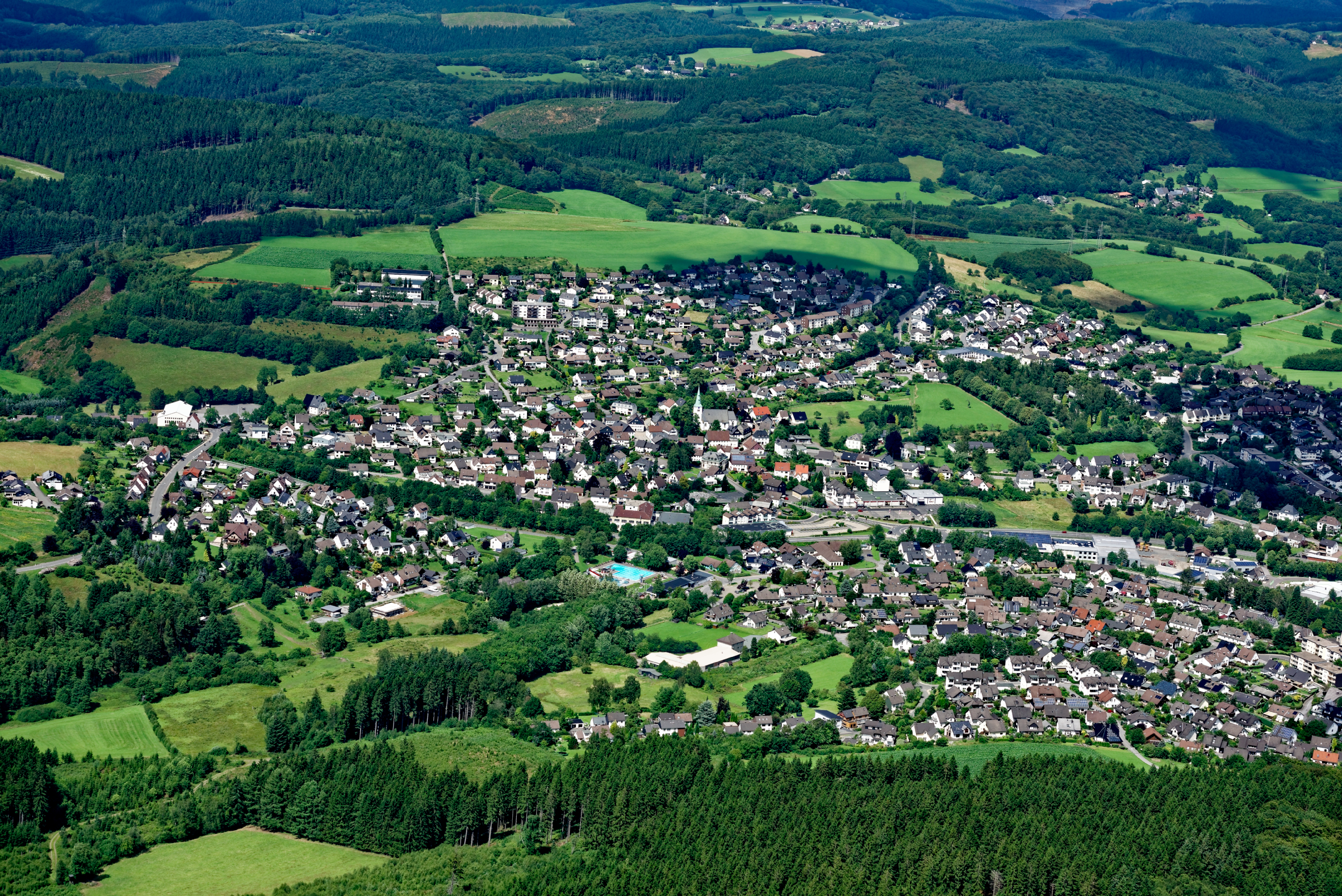 Luftaufnahme: Übersicht über den Herscheider Ortskern, Nordrhein-Westfalen.